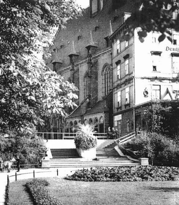 Die ehemals für das Richard-Wagner-Denkmal von Max Klinger vorgesehene Treppe zwischen Fleischerplatz und Matthäikirchhof in Leipzig, 1913